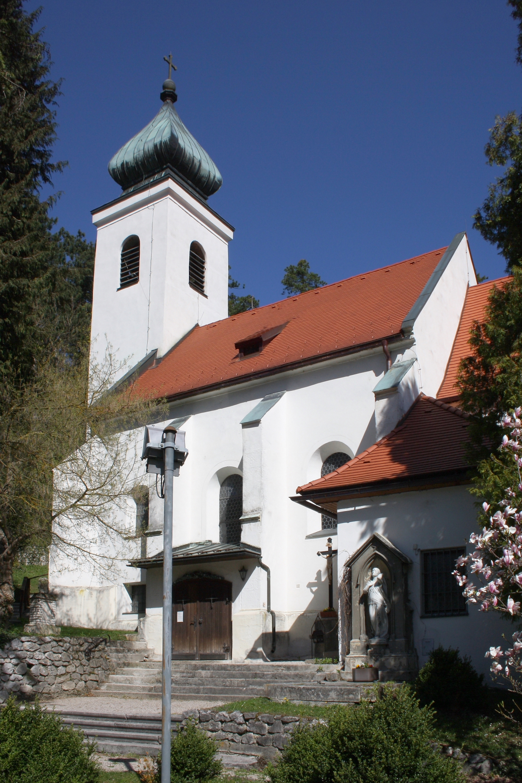 Die röm.-kath. Pfarrkirche hl. Jakob d. Ä. in der niederösterreichischen Marktgemeinde Waldegg.